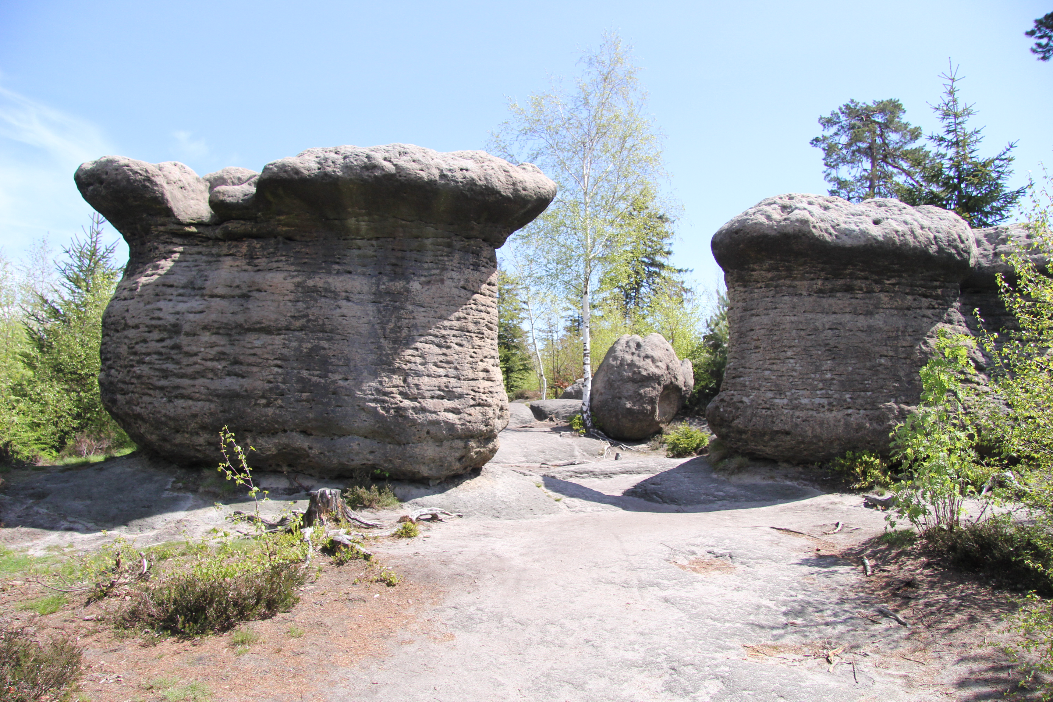 Kamenné hřiby v Broumovských stěnách (2017)